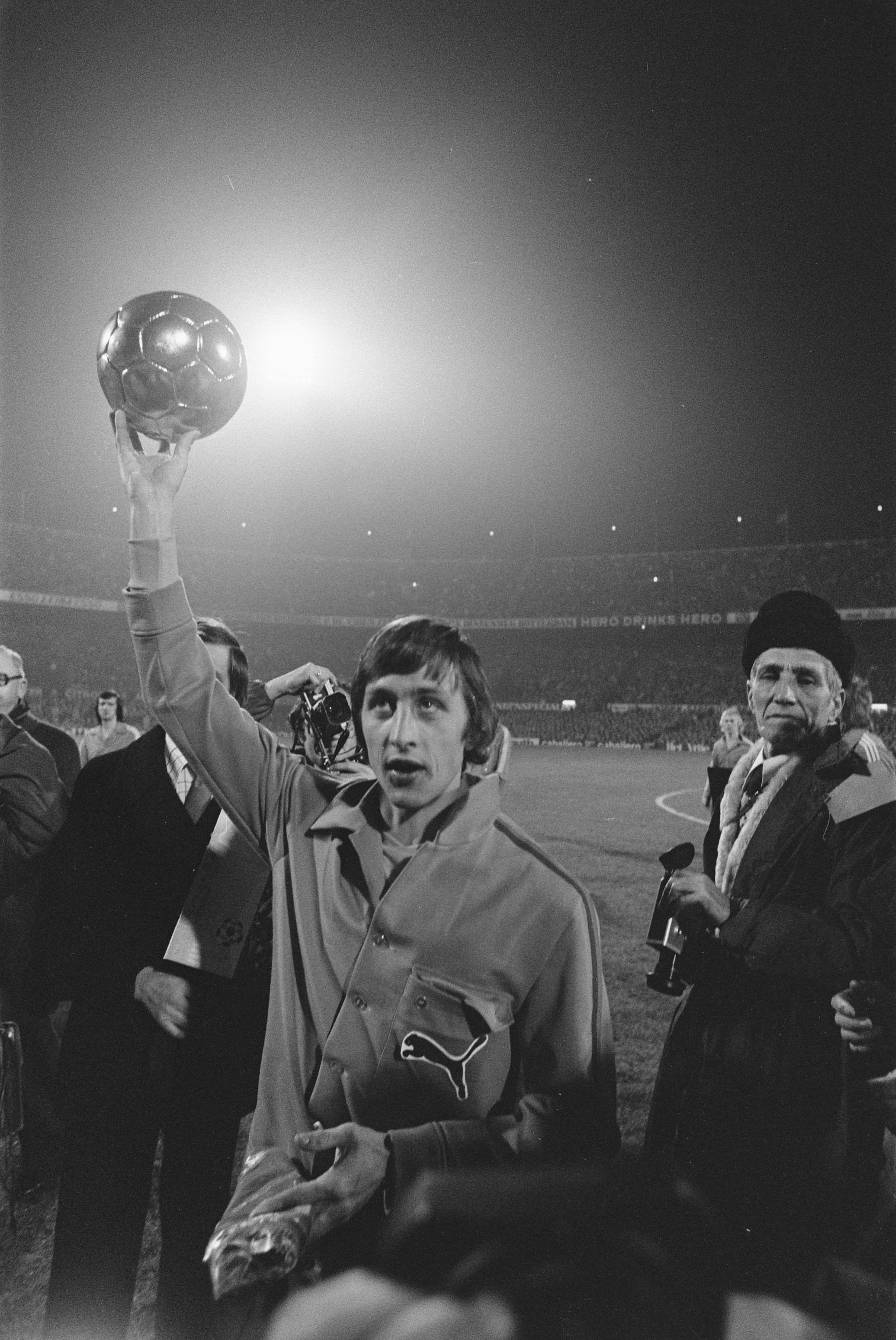 Collectie / Archief : Fotocollectie Anefo Reportage / Serie : [ onbekend ] Beschrijving : Johan Cruijff kreeg gouden bal voor "Beste voetballer van WK74" voor aanvang Nederland tegen Italie Datum : 20 november 1974 Trefwoorden : spelers, sport, voetbal Persoonsnaam : Cruijff, Johan Fotograaf : Mieremet, Rob / Anefo Auteursrechthebbende : Nationaal Archief Materiaalsoort : Negatief (zwart/wit) Nummer archiefinventaris : bekijk toegang 2.24.01.05 Bestanddeelnummer : 927-5930